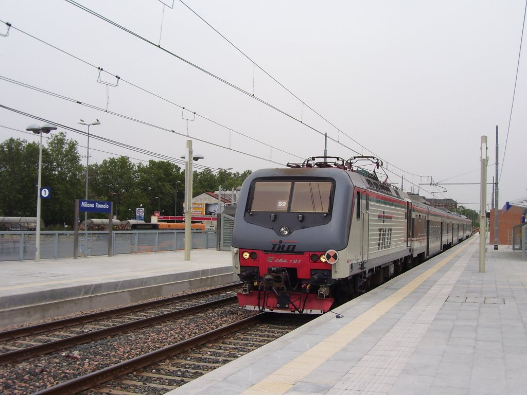 Un convoglio in servizio sulla S9 fotografato da me a Milano Romolo il 20 giugno 2006